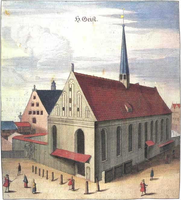 Gdańsk. Kościół św. Ducha, obecnie sala gimnastyczna.